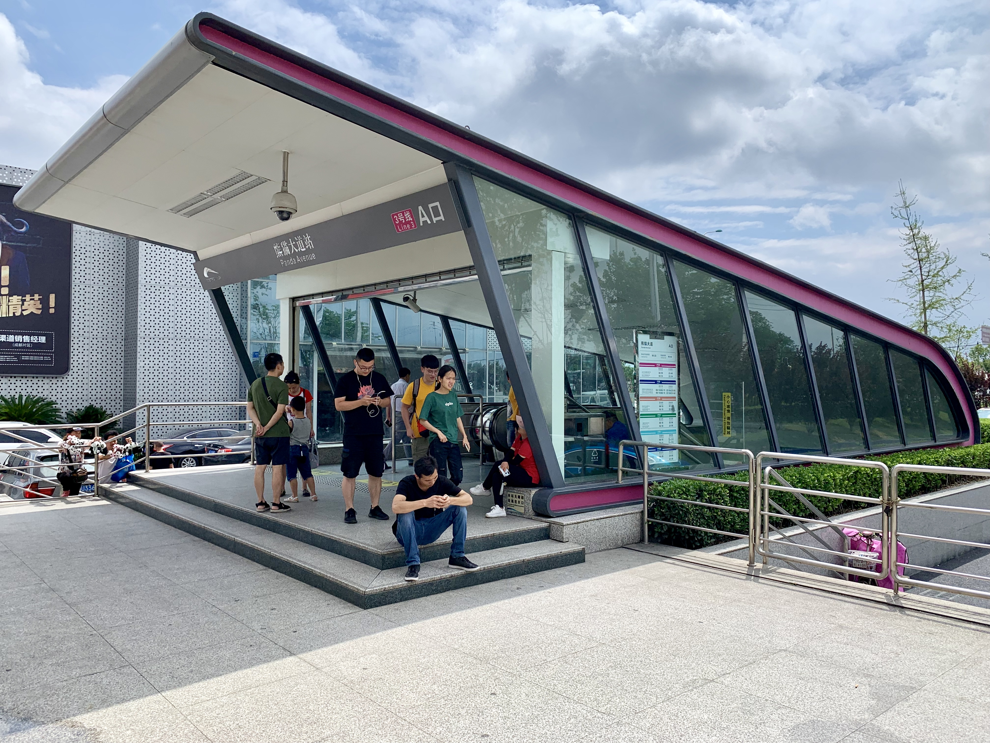 成都地铁熊猫大道站